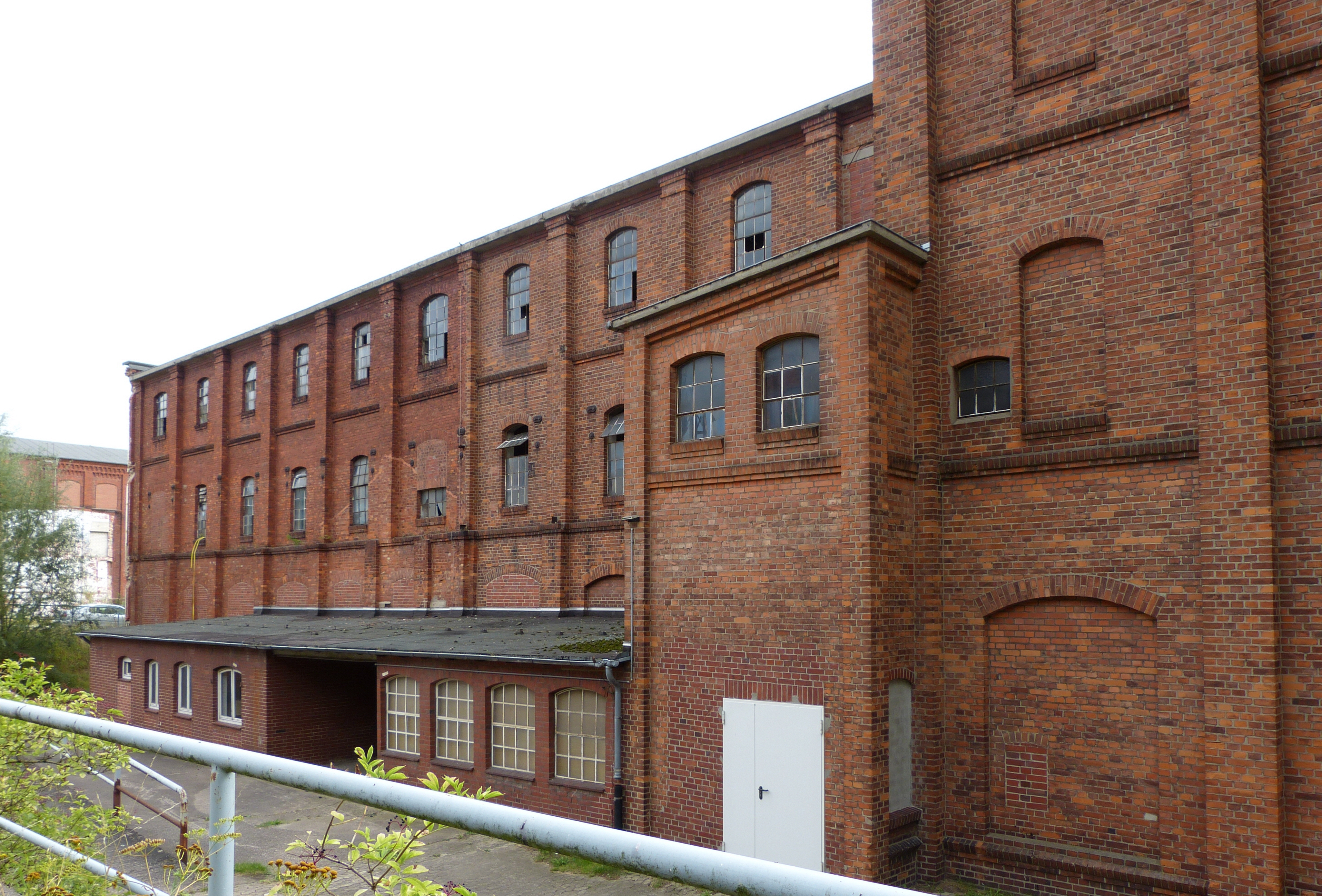 Bremer Wollkämmerei, Haus 132A, Wäscherei in Bremen, Landrat-Christians-Straße 95Das abgebildete Objekt ist ein geschütztes Kulturdenkmal in der Freien Hansestadt Bremen, mit der Nr. 2007 beim Landesamt für Denkmalpflege registriert.